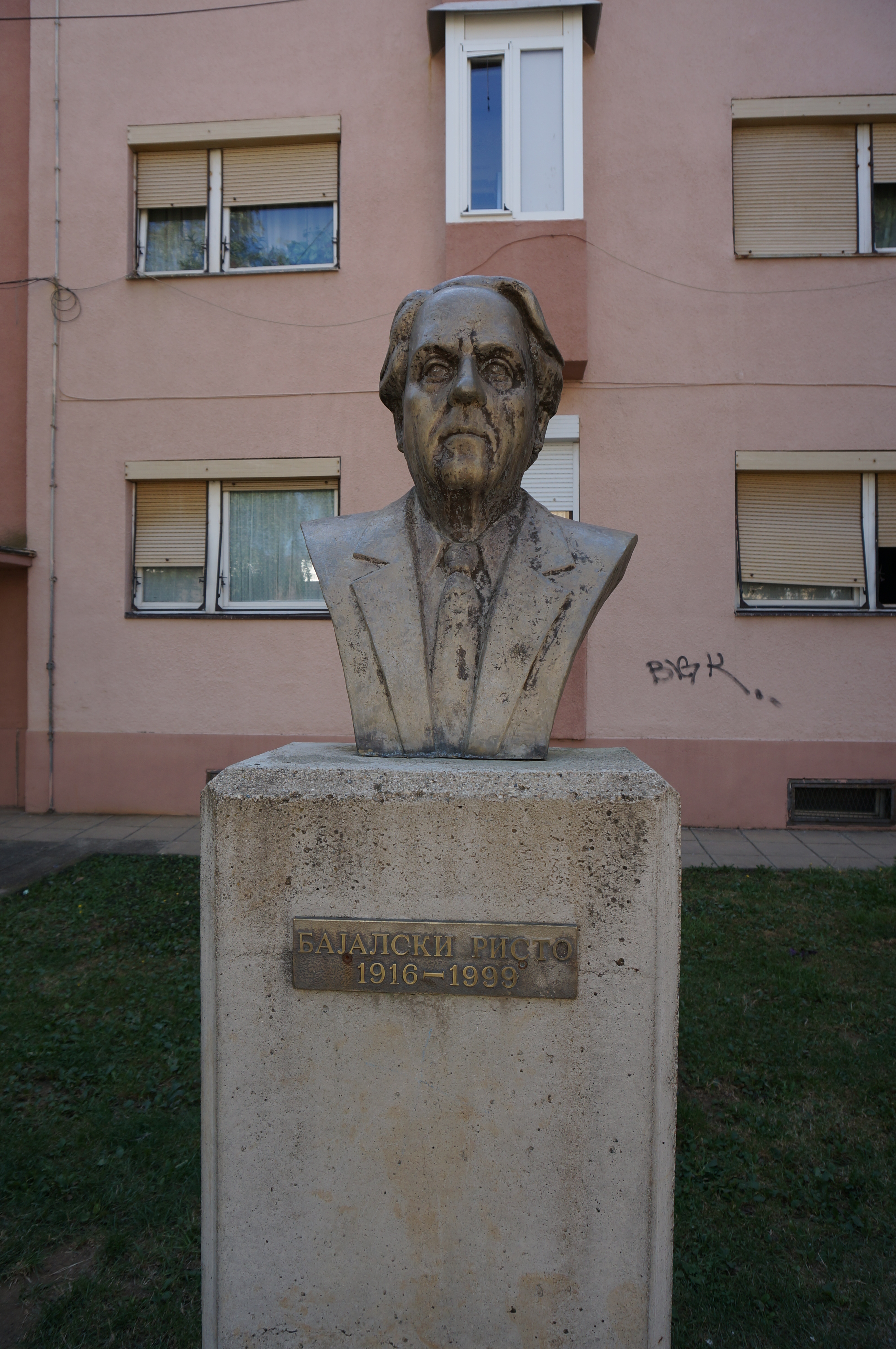 Monument à Guevgueli.